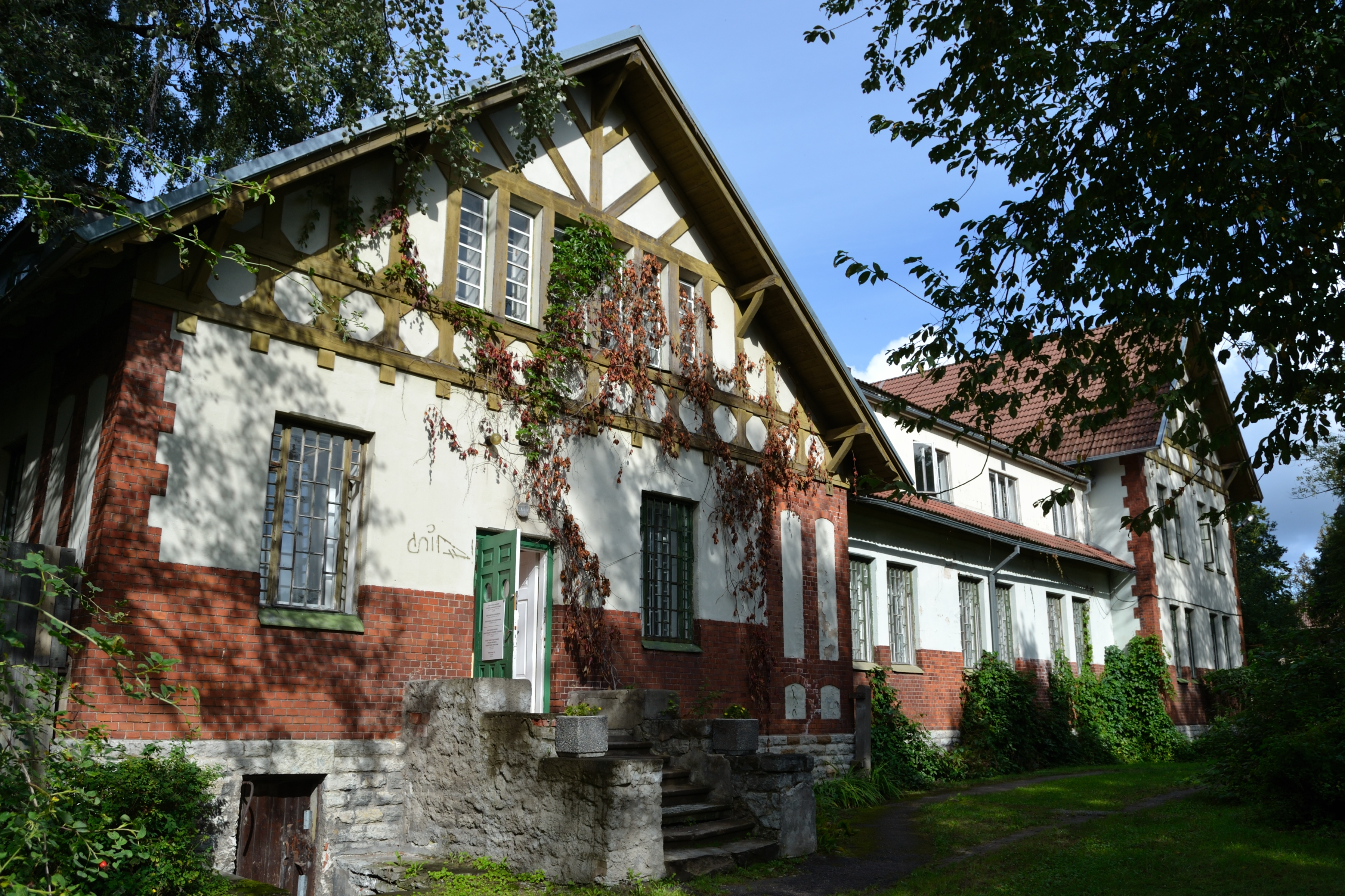 Tallinn, Seewaldi vaimuhaigla ravikorpus Paldiski mnt 52-5, 1909